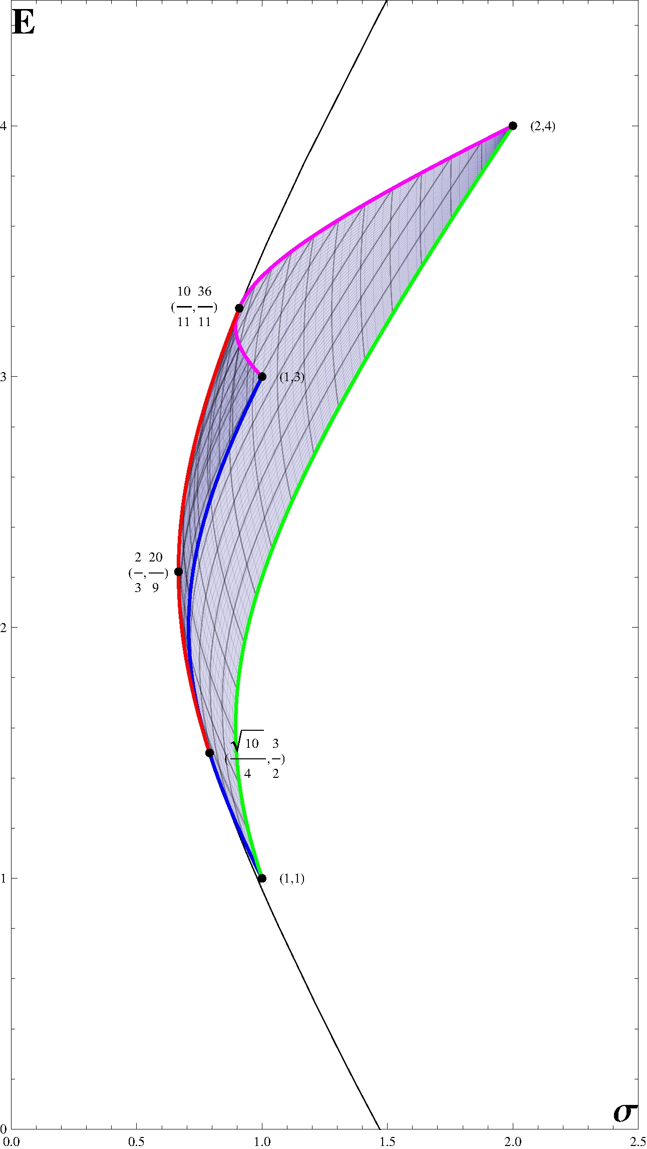 Rysunek do przykładów dla modelu Markowitza